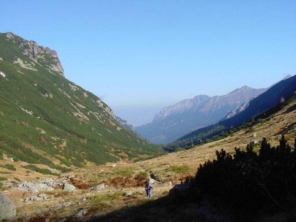 Javorova valley and spring of Javorinka river